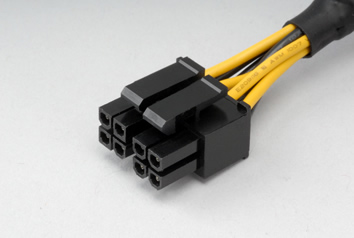 Rozszerzona, 8-stykowa, wersja 4-stykowego wtyku ATX12V/EPS12V.